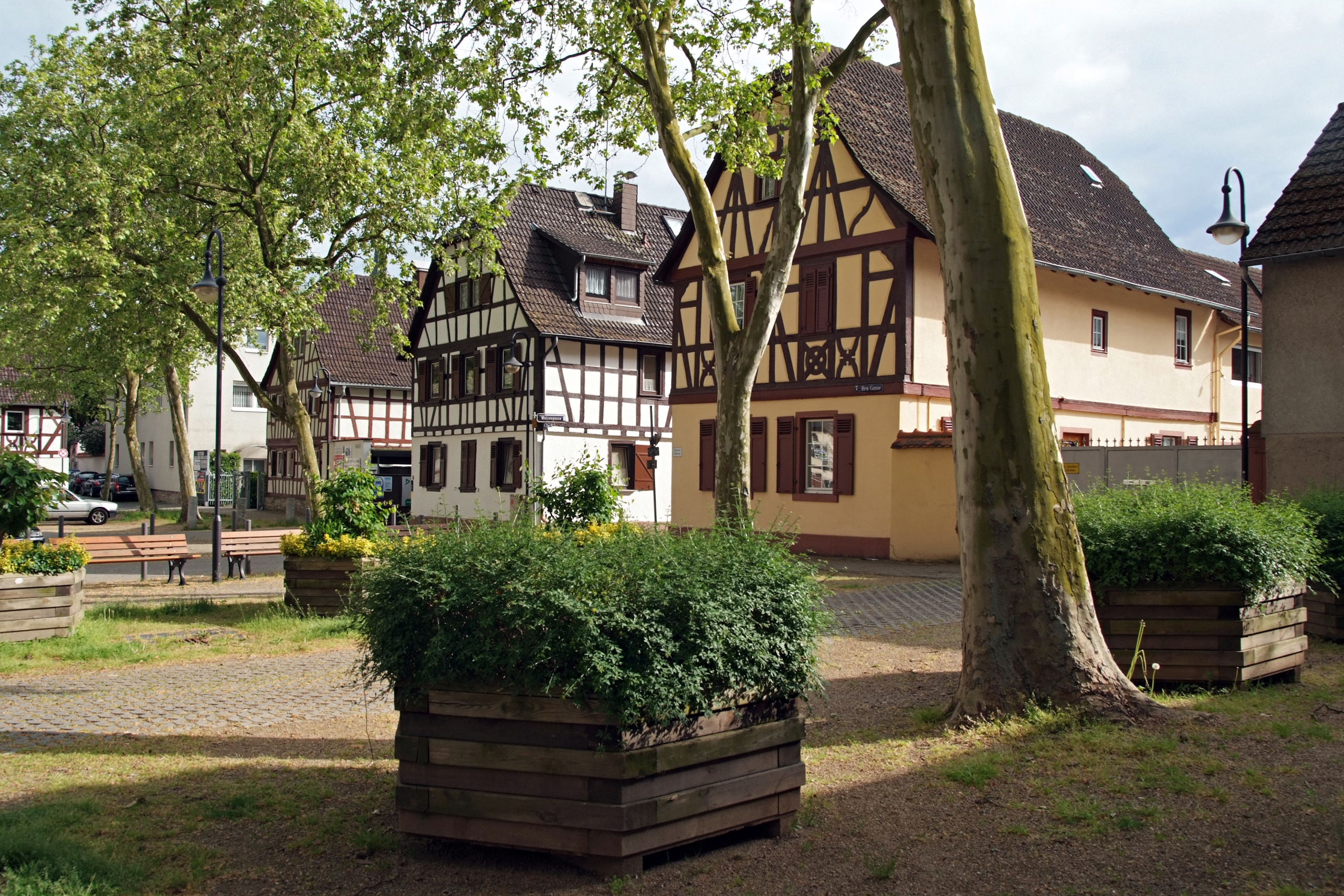 Unterliederbach Markt